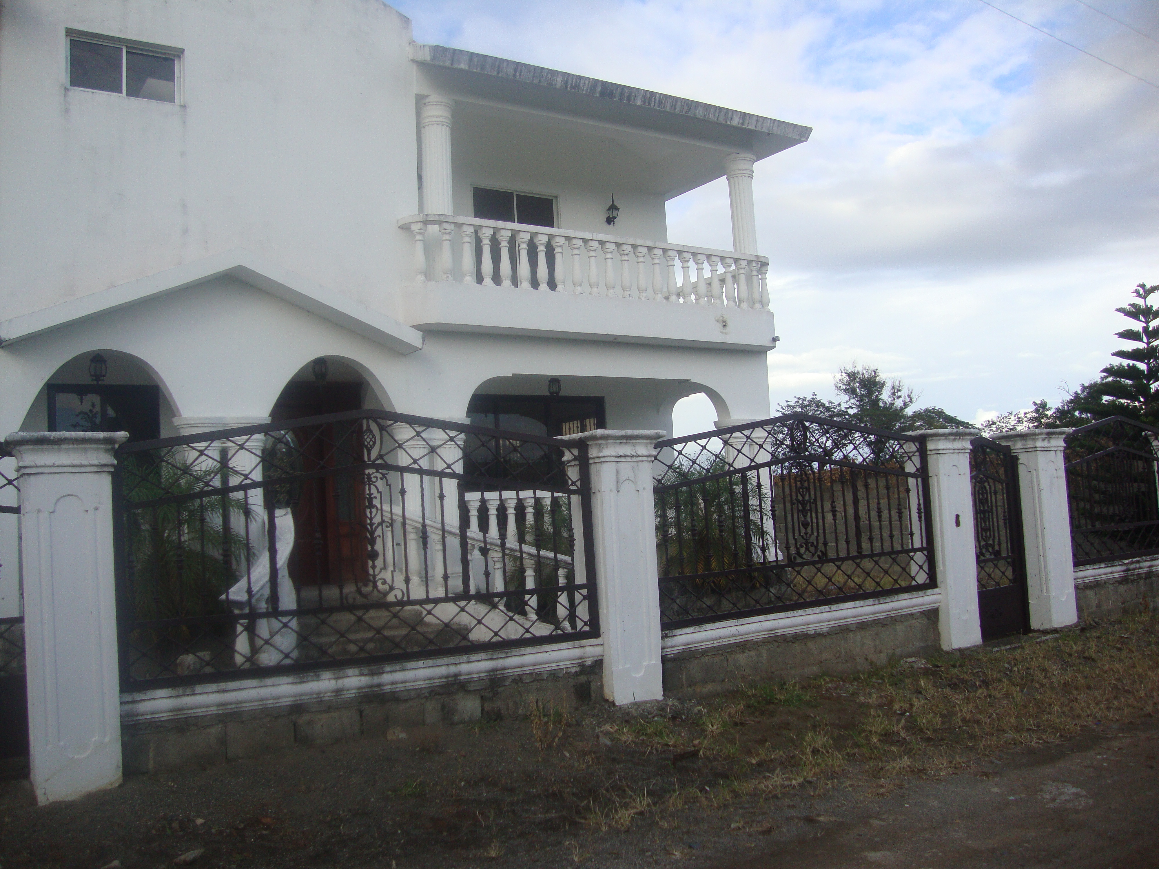 El Malecón, Fantino 43000, Dominican Republic